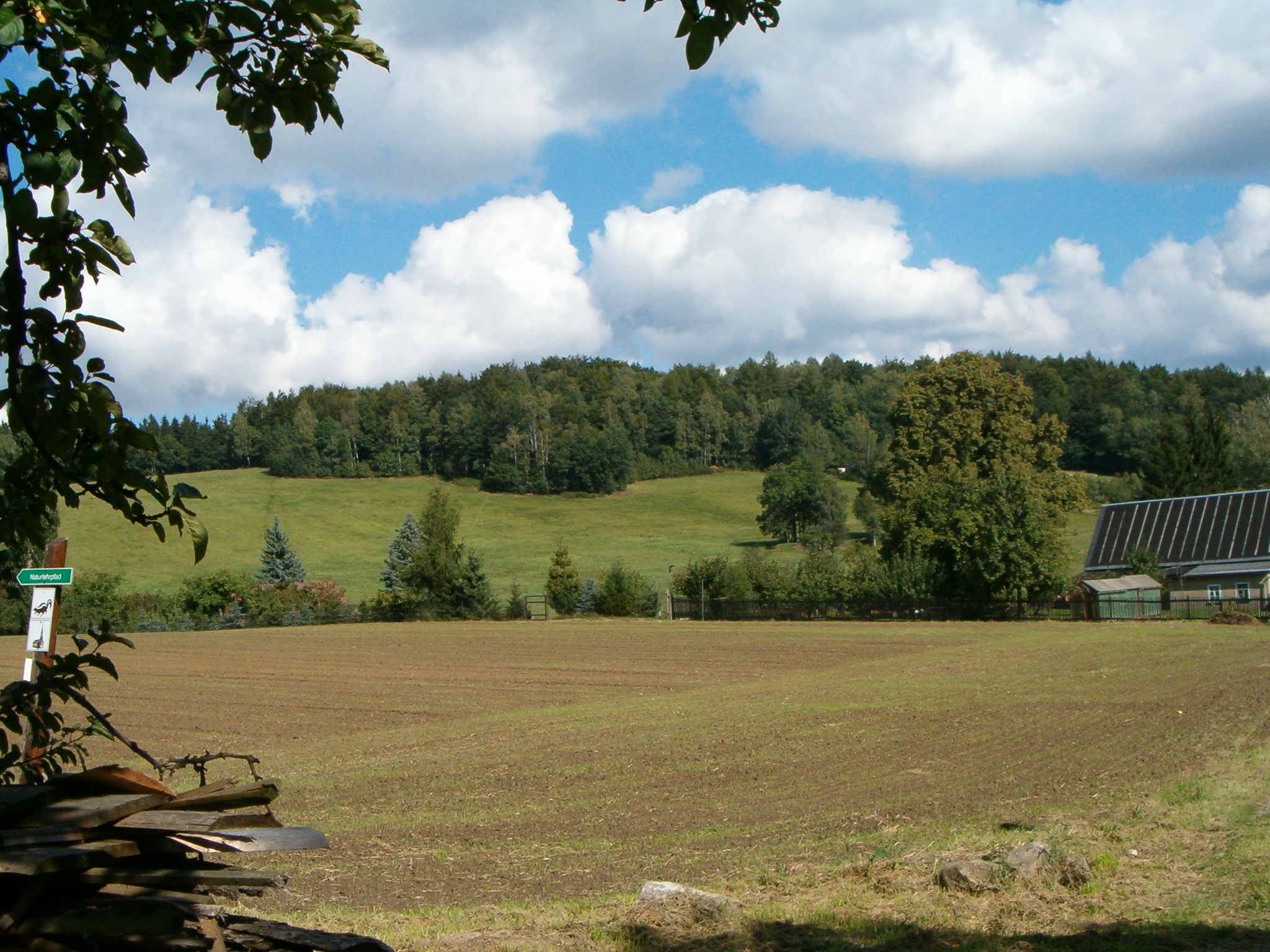 Blick zur Funkenburg bei Wehrsdorf